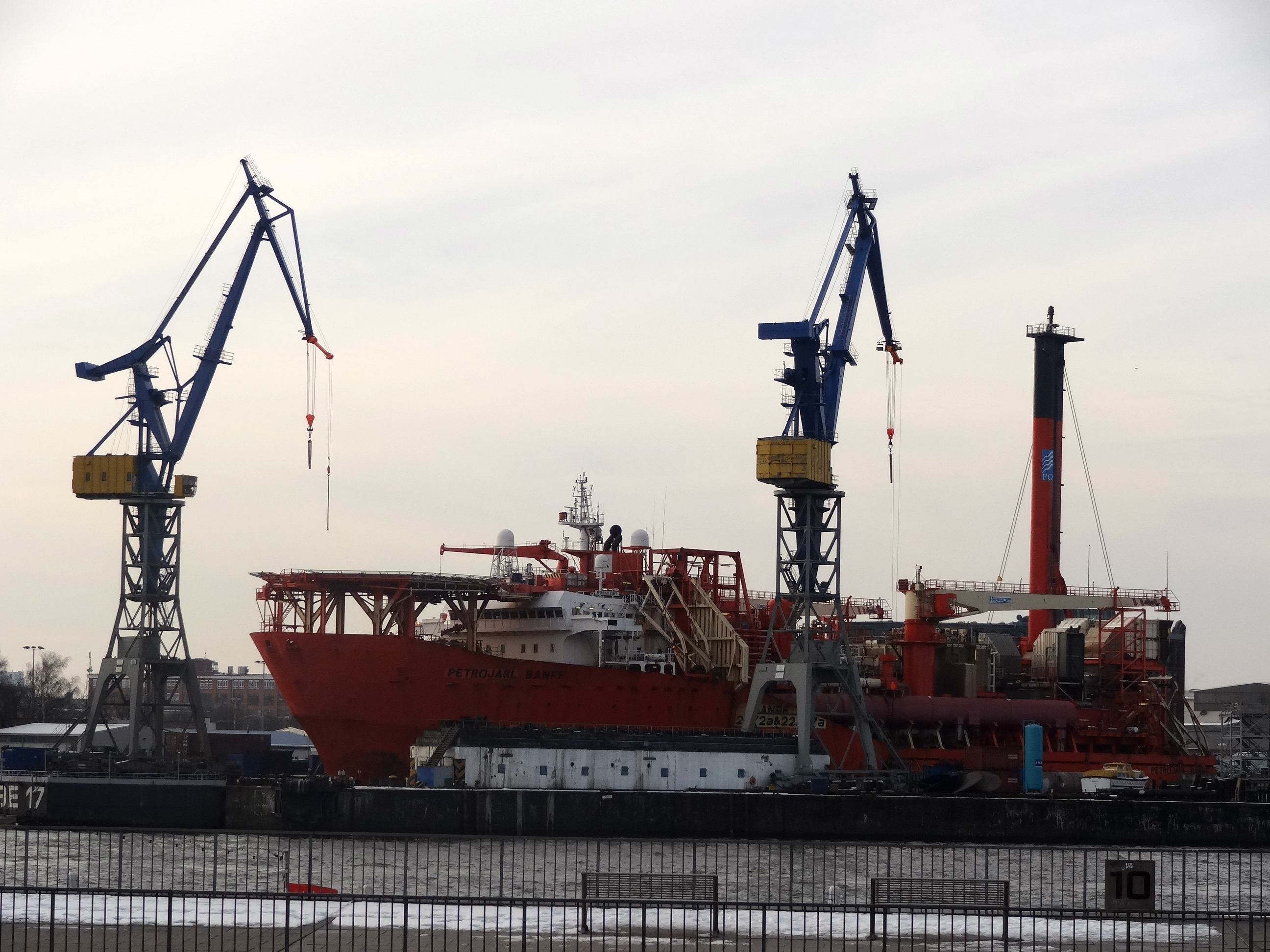 Petrojarl Banff (Schiff, 1997) in Hamburg, Ölbohrschiff